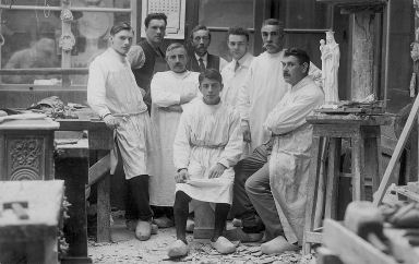 Foto van het Atelier Van Bokhoven en Jonkers in 's-Hertogenbosch. v.l.n.r. J. de Bresser, Th. van de Akker, B. van de Wiel, Van der Hoogen, P. Verdonk, J. Arie, G. Kuhnen, op de voorgrond J. Voight